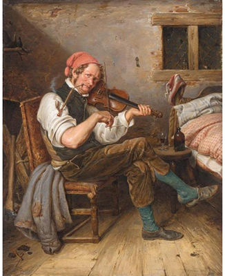 Der Geigenspieler